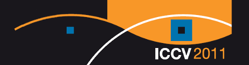 Logo der ICCV 2011, beschnitten